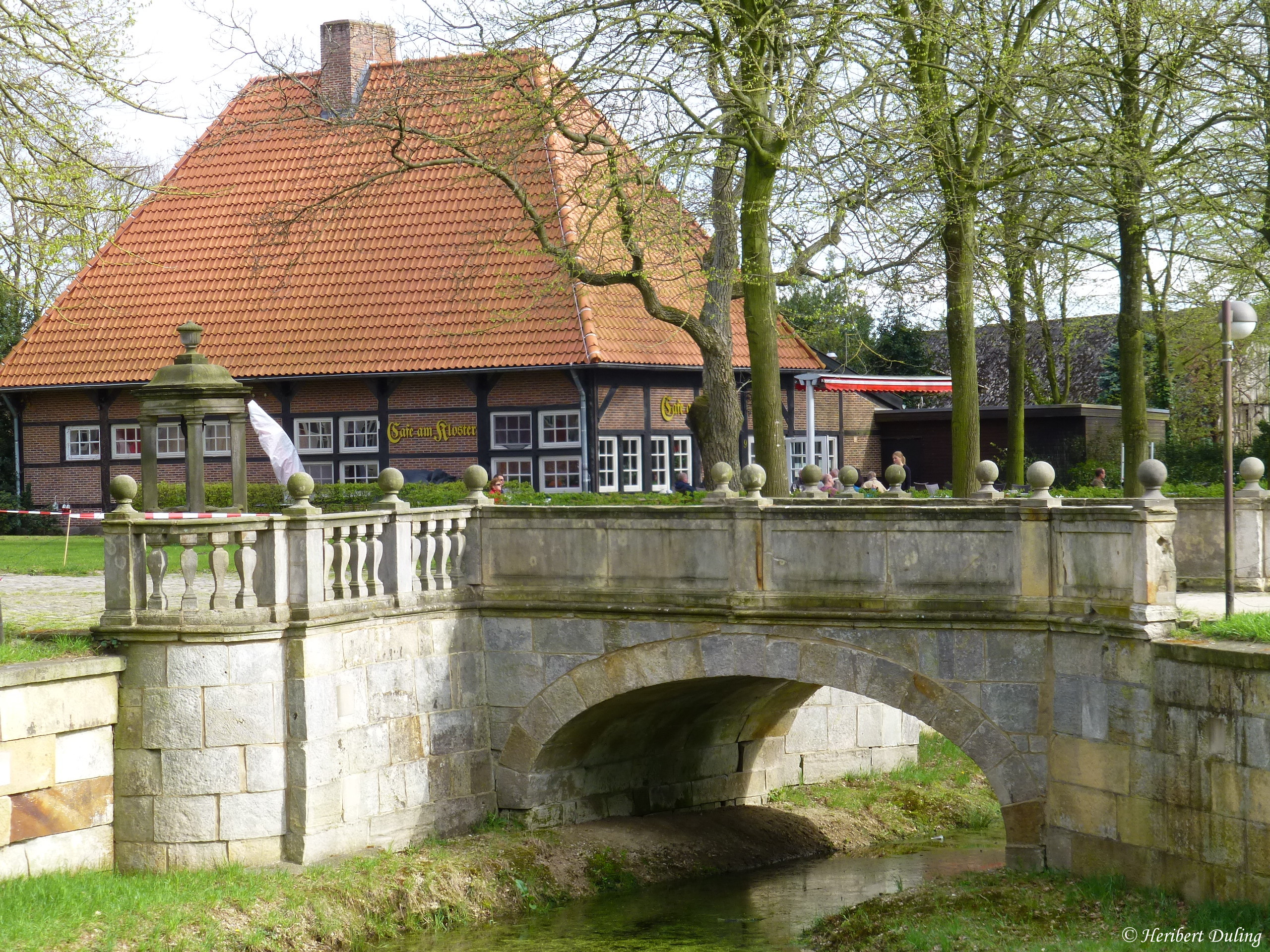 Kolkbrücke und Klostercafe